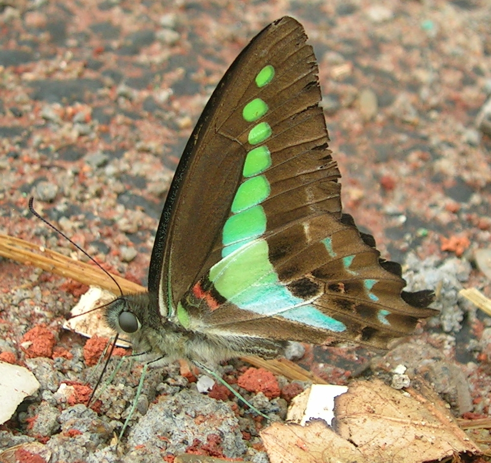 Graphium sarpedon, at Mudumalai, Tamilnadu